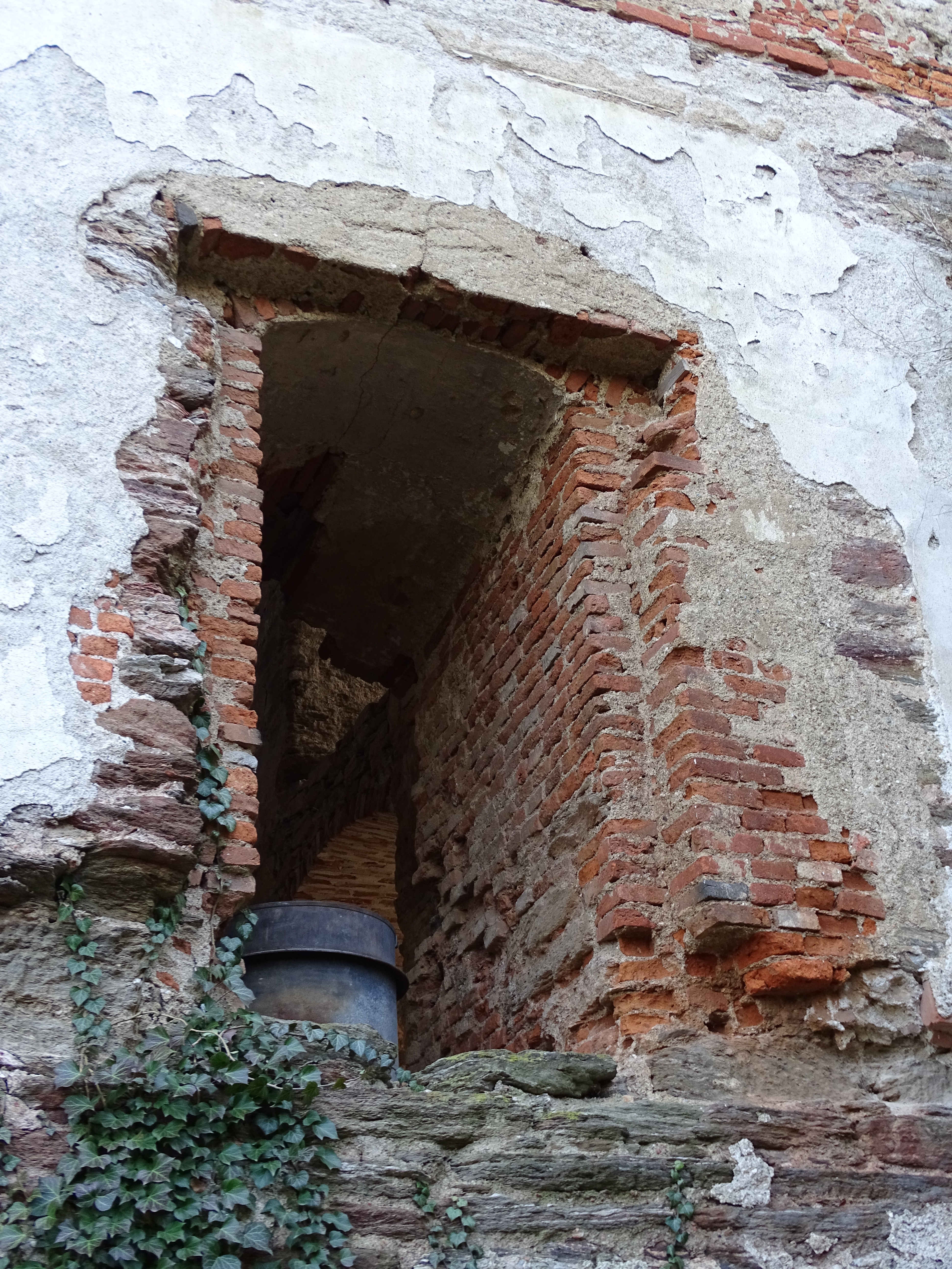 Eine der Öffnungen an der Nordseite des Bergfriedes der Burg Ligist